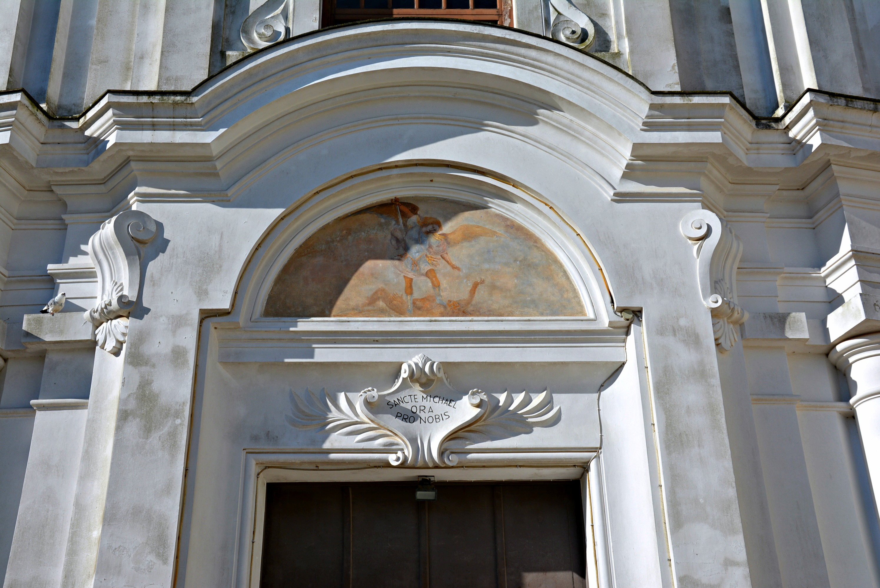 Vedi titolo